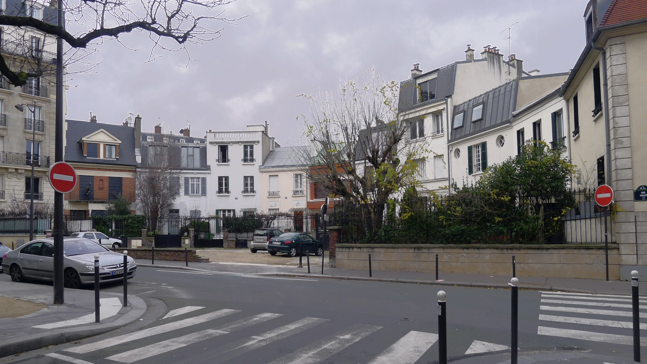 Rue Hallé - Paris XIV